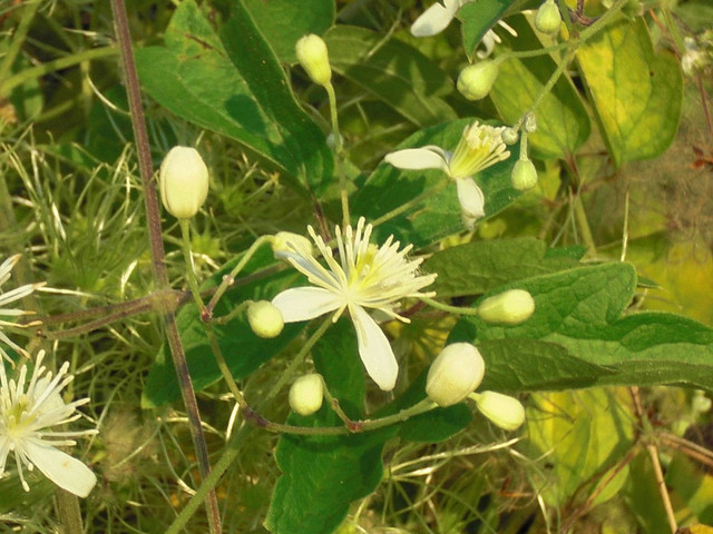 串鼻龍蔓生在草地上，開著一朵朵可愛的小白花。 羅東溪沿岸自行車專用道 Lotung, Taiwan 2009/09/06